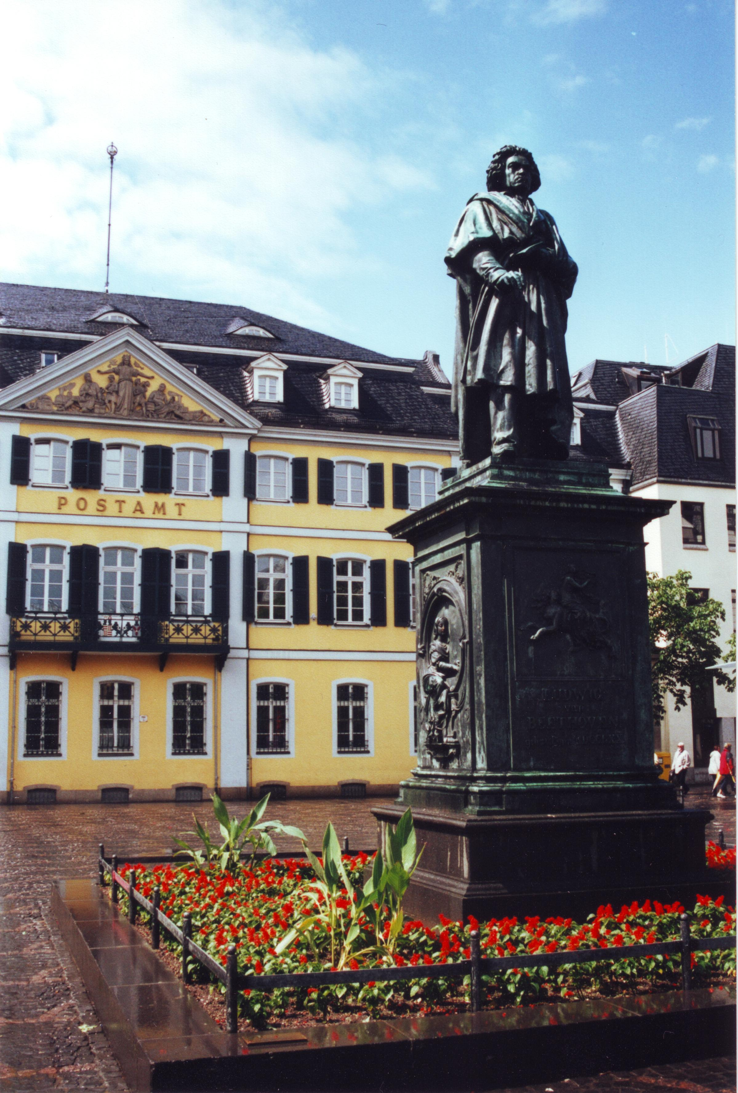 Bonner Münsterplatz mit Beethoven-Denkmal